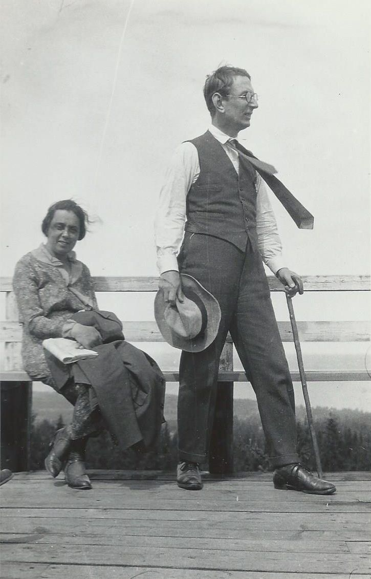 "Till Plintsbergs torn och Sjugareby Vid midsommartid vi lyckades fly."